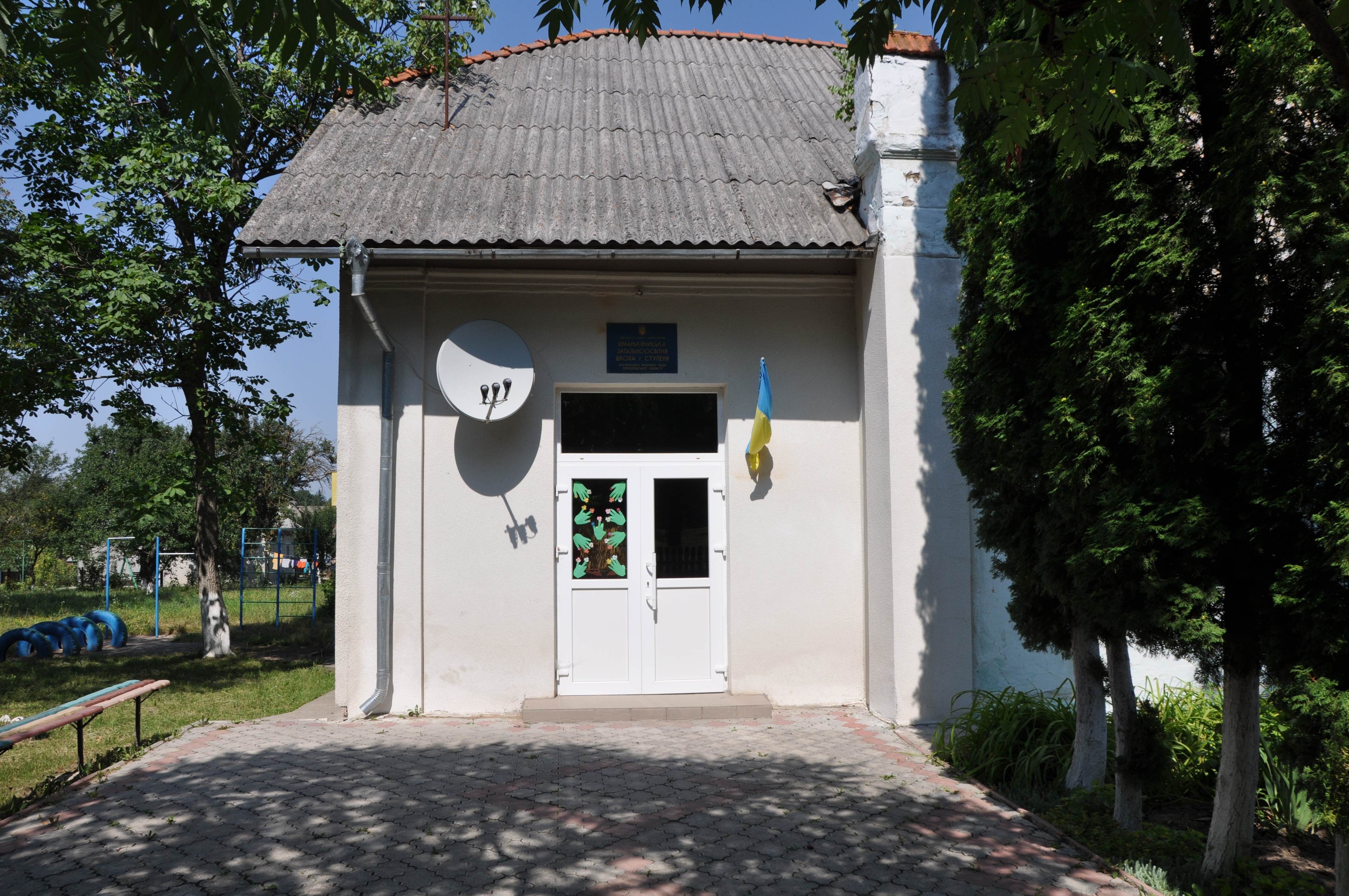 Школа в селі Шманьківчики Чортківського району Тернопільської області України.